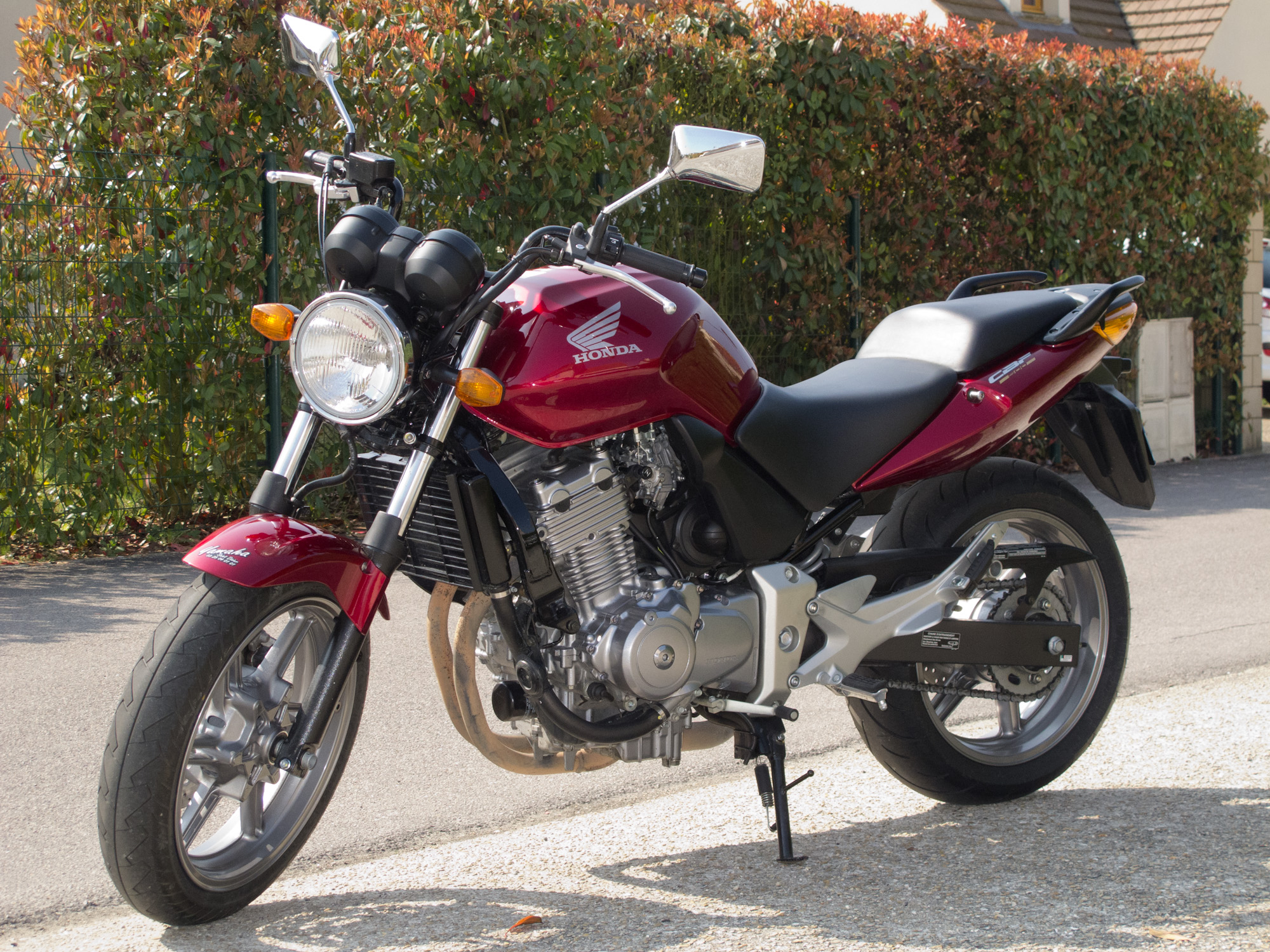 Honda 500 CBF 2007